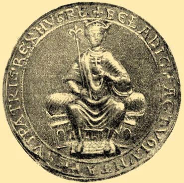 Béla IV. pečeť